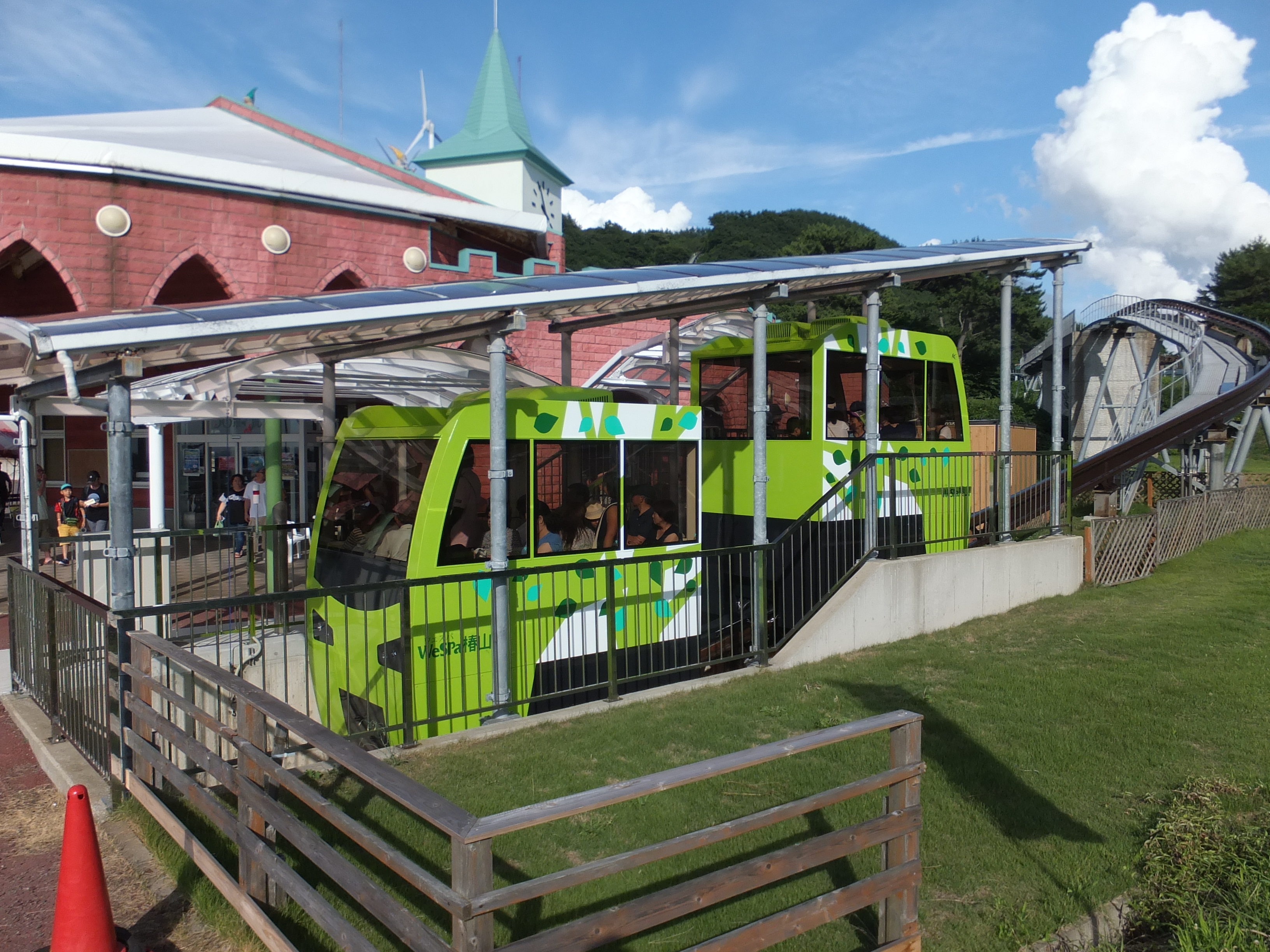 ウェスパ椿山のスロープカー「しらかみ」号。2017年に更新工事が行われ、7月28日より「リゾートしらかみ橅編成」をモチーフとした2代目車両が運行を開始した。